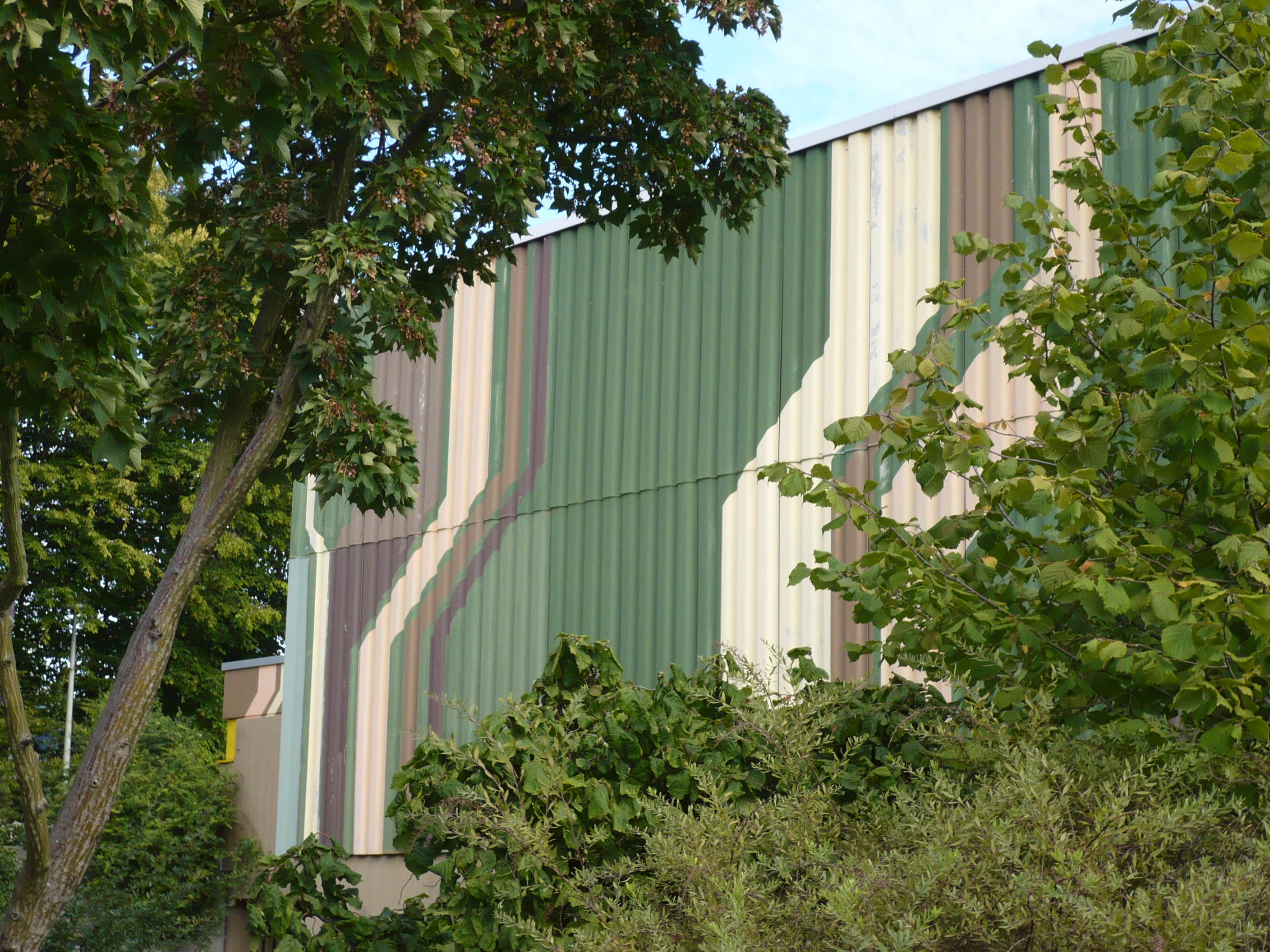 Wandmalerei als Kunst am Bau von Wolfgang Trust, Bienwaldhalle Wörth am Rhein, angefertigt 1976, Bild zeigt heutigen Zustand